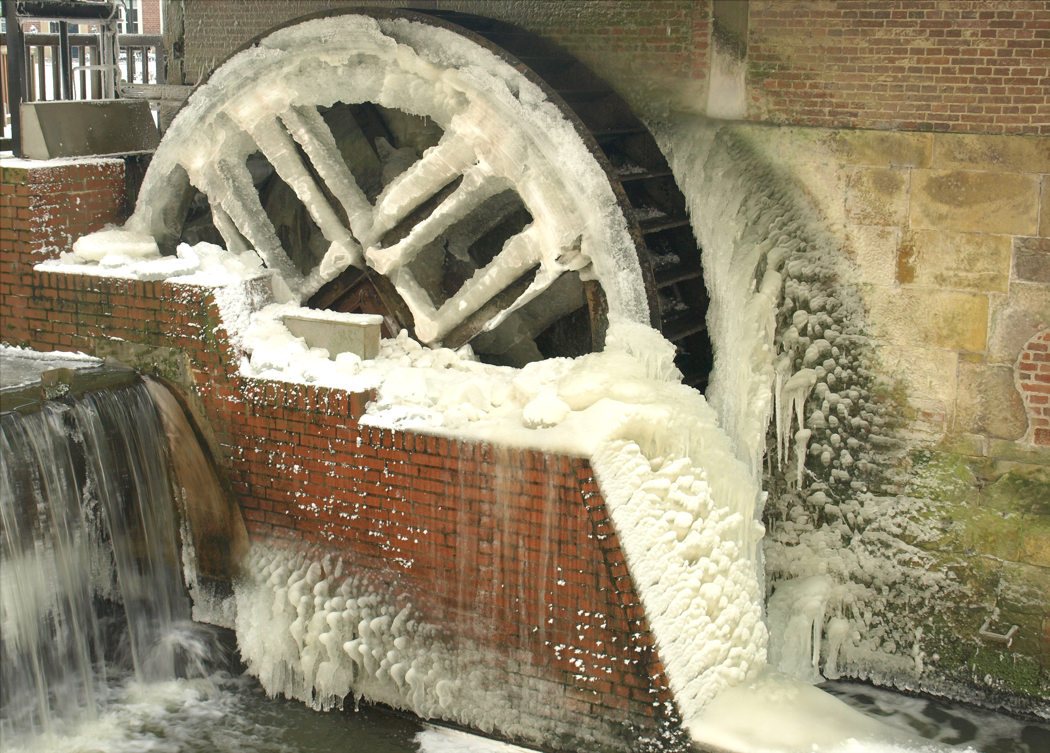 Vereistes Wasserrad an der Haarmühle in Ahaus, Ortsteil Alstätte, Beßlinghook 57 This is a photograph of an architectural monument.It is on the list of cultural monuments of Ahaus